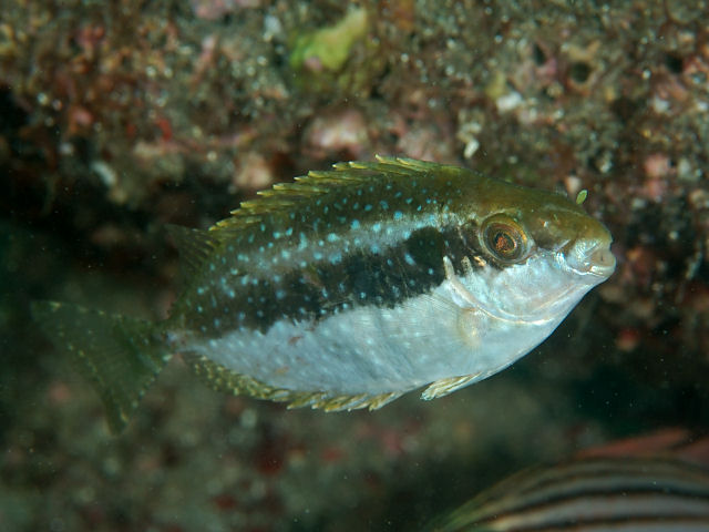 アイゴ Siganus fuscescens